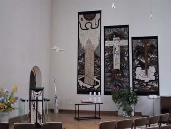 SCHALOM-Haus, Innenraum